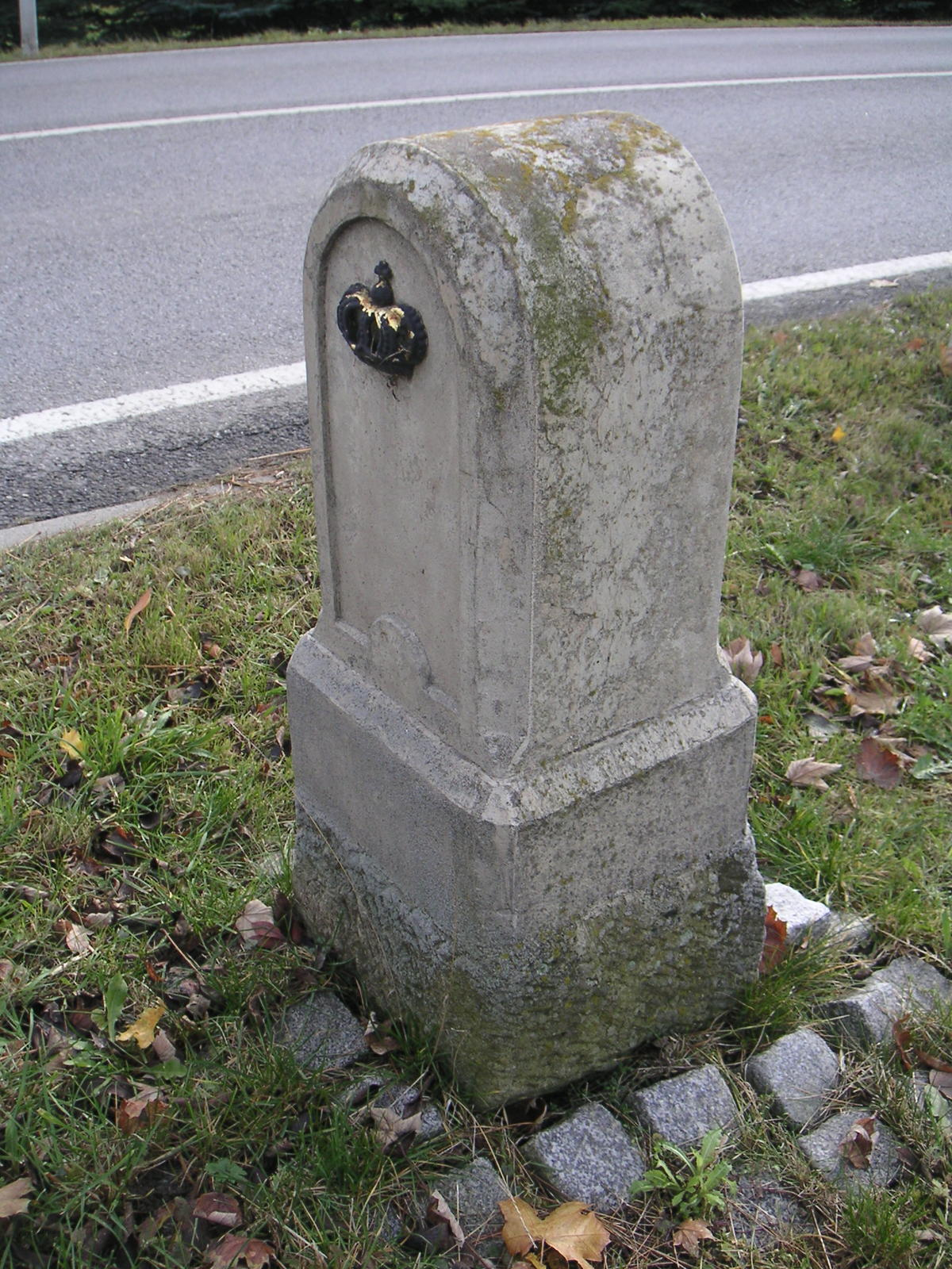 Kgl-sächsischer Halbmeilenstein in Hilmersdorf, Siedlungsweg/B101